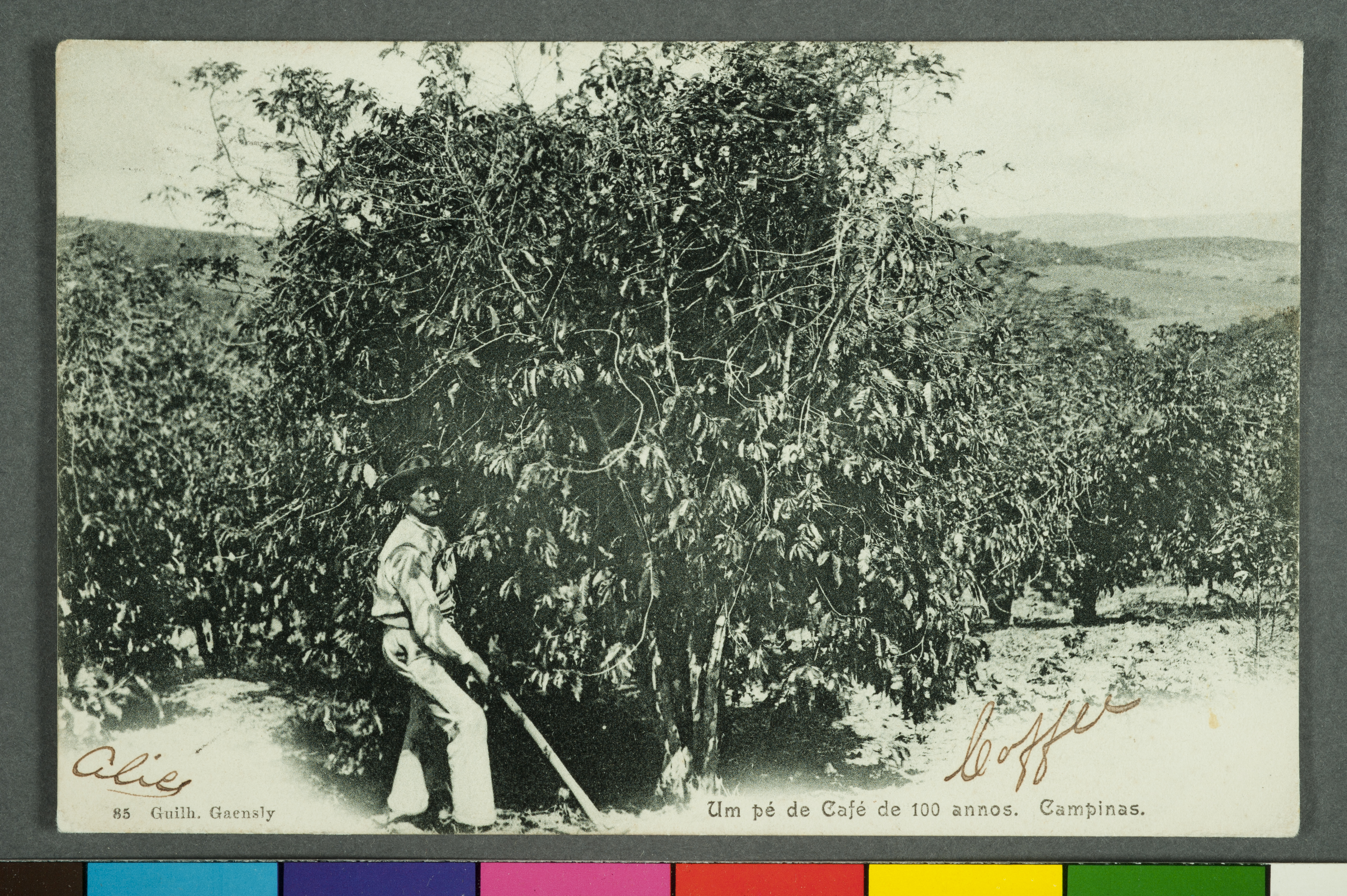 Obra que integra o acervo do Museu Paulista da USP.